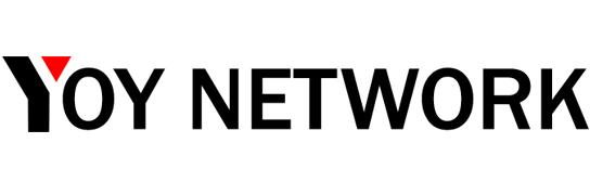 Logo bagi laman web YOY Network